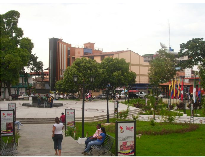 Vista de la Plaza Bolívar de la Ciudad de El Vigía